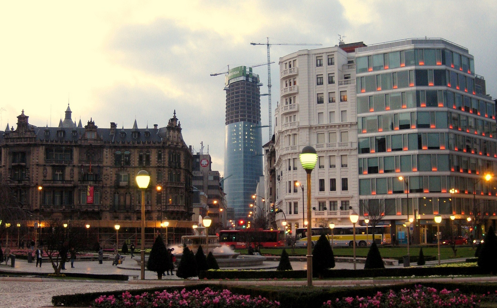 Iberdrola Dorrea Moyua plazatik, Bilbo (Bizkaia) EH Torre Iberdrola desde la Plaza Moyua (Bilbao)